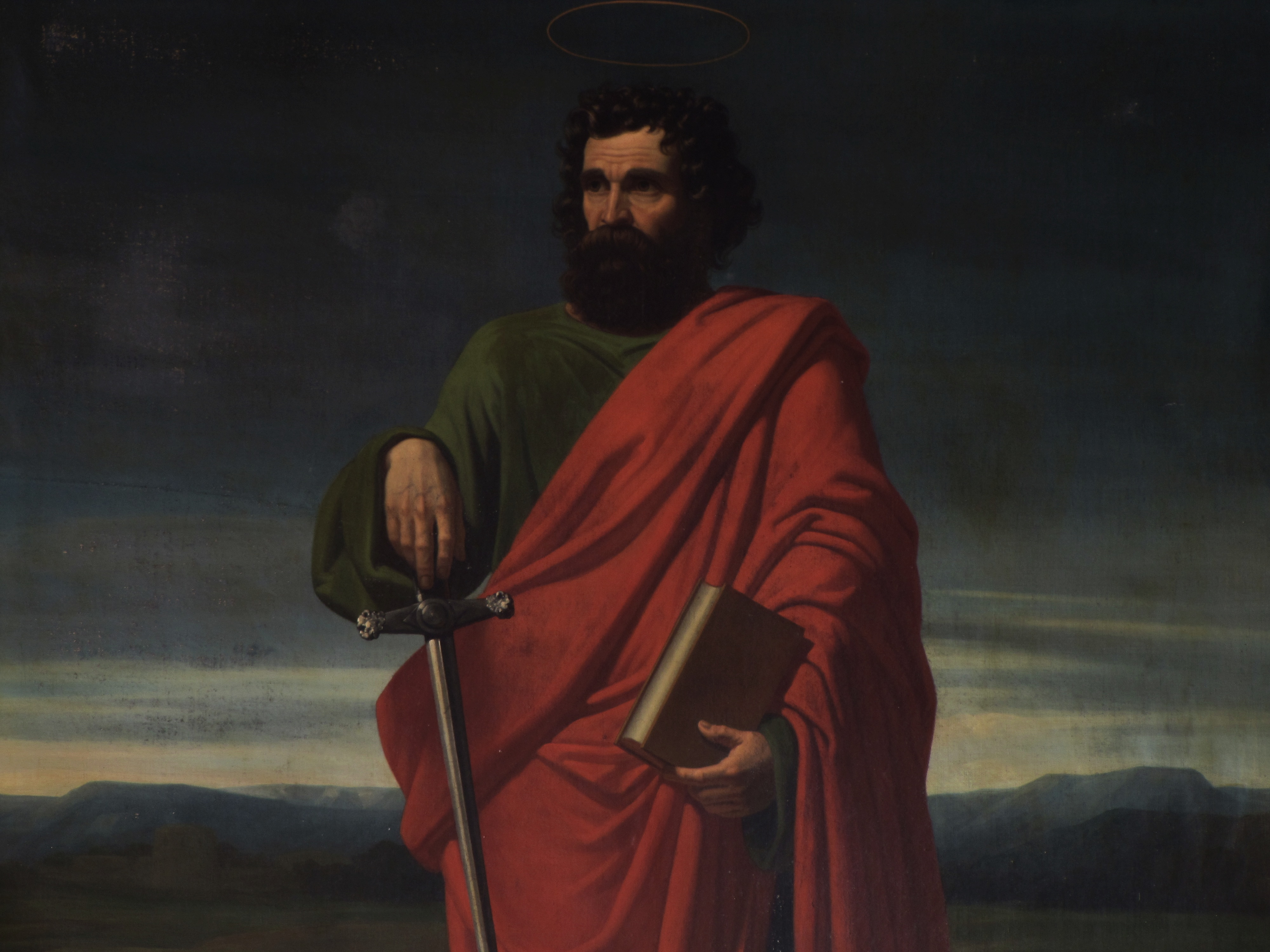 Alsace, Bas-Rhin, Wissembourg, Église abbatiale Saints-Pierre-et-Paul (PA00085247, IA67008036). Tableau "Saint-Paul" (Pierre-André CASSEL, huile sur toile, 260cm de large, 1844)